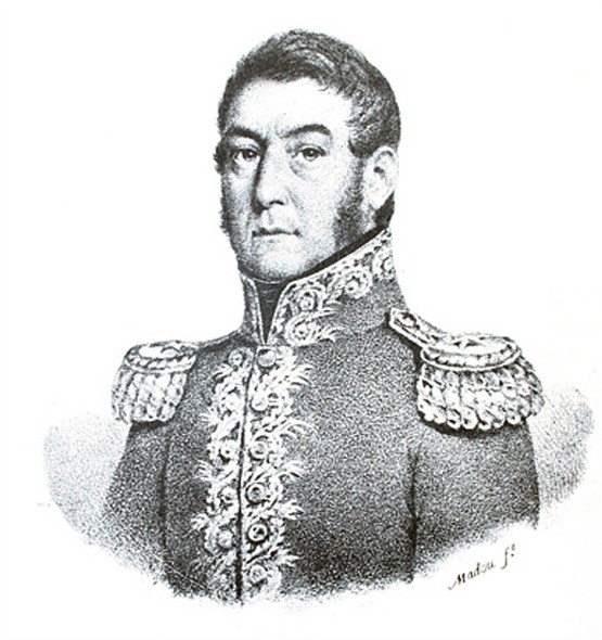 Litografía de José de San Martín